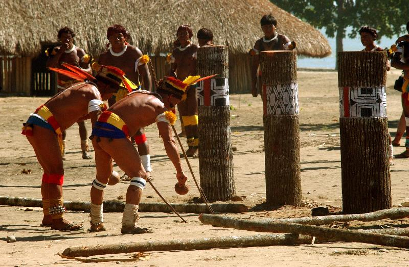 Alto Xingu(MT) - Dança em frente aos troncos. Festa do Kuarup na aldeia Kamayurá